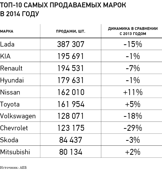 ТОП-10 самых продаваемых марок автомобилей в России в 2014 году